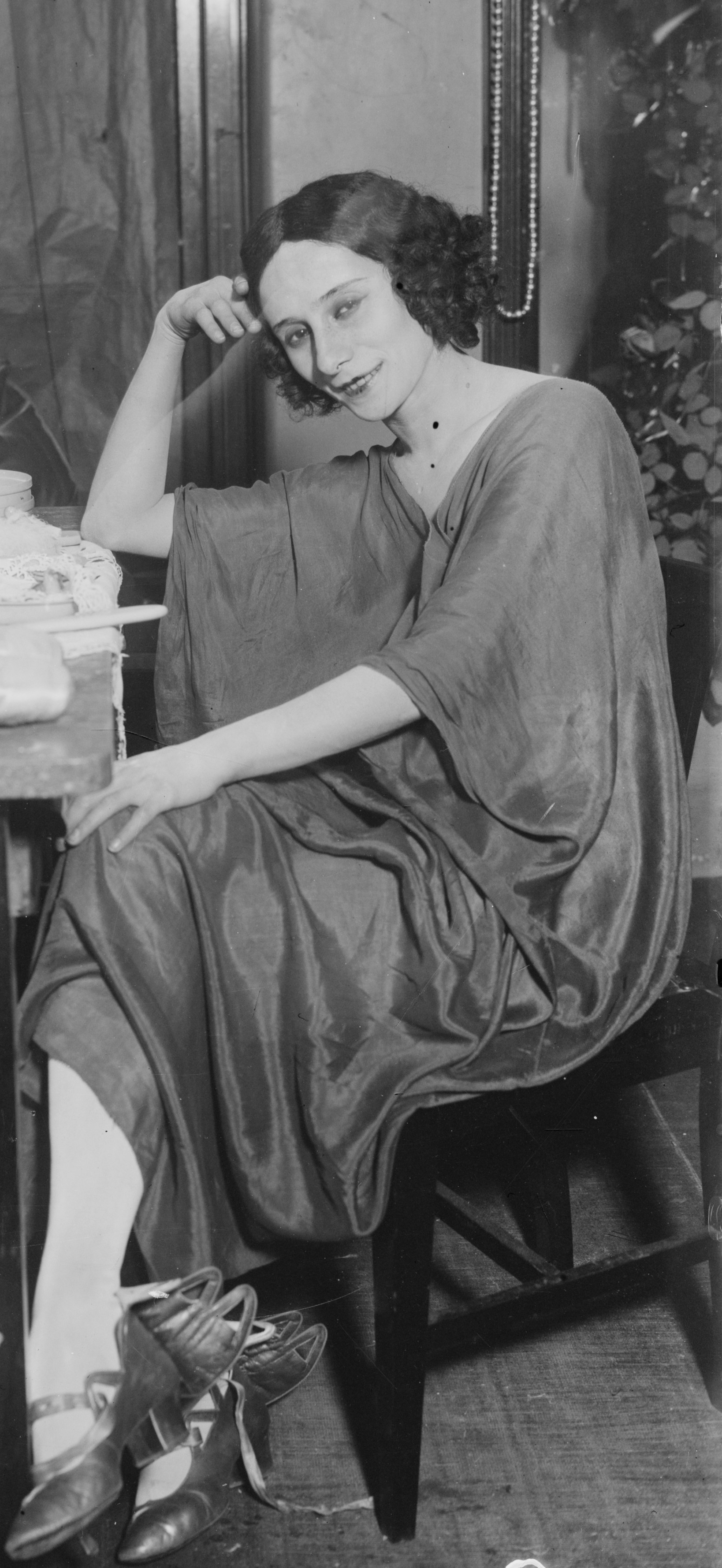 Russian ballet dancer Anna Pavlova (1881-1931)